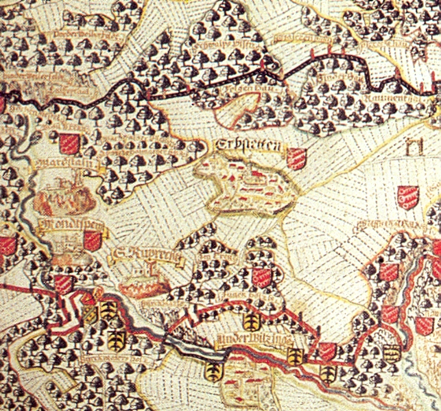 Gemarkung Erbstetten. Ausschnitt aus einer Karte „Aigentlicher Entwurff Der Gnädigen Herrschafft Schülzburg, Granheim, Erbstetten und Ahnhausen. … Anno 1721 … von einer Größeren Alten Charten Geometrice abgetragen und illuminiert worden …“